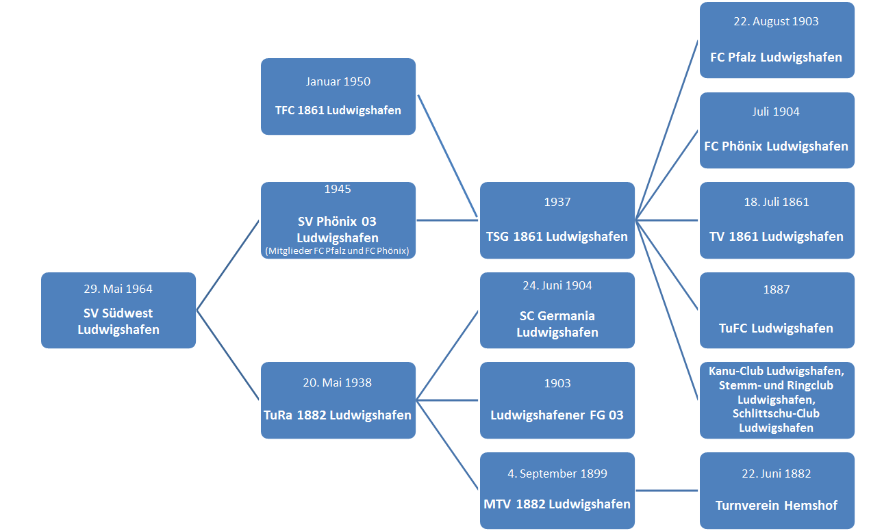 Vereinfachte Darstellung zur Entstehung des Sportvereins SV Südwest Ludwigshafen.